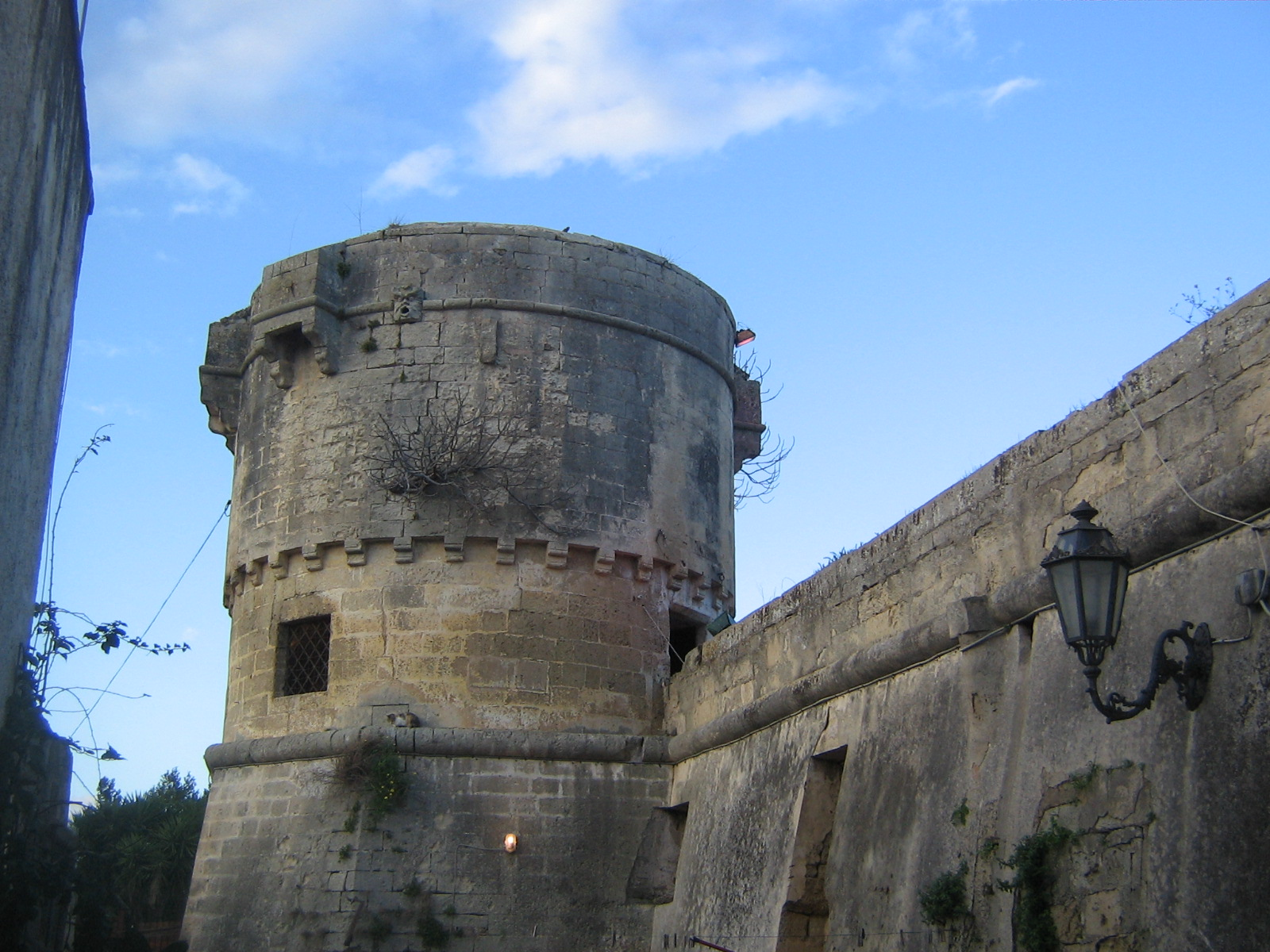 Torre del Castello di Lizzanello